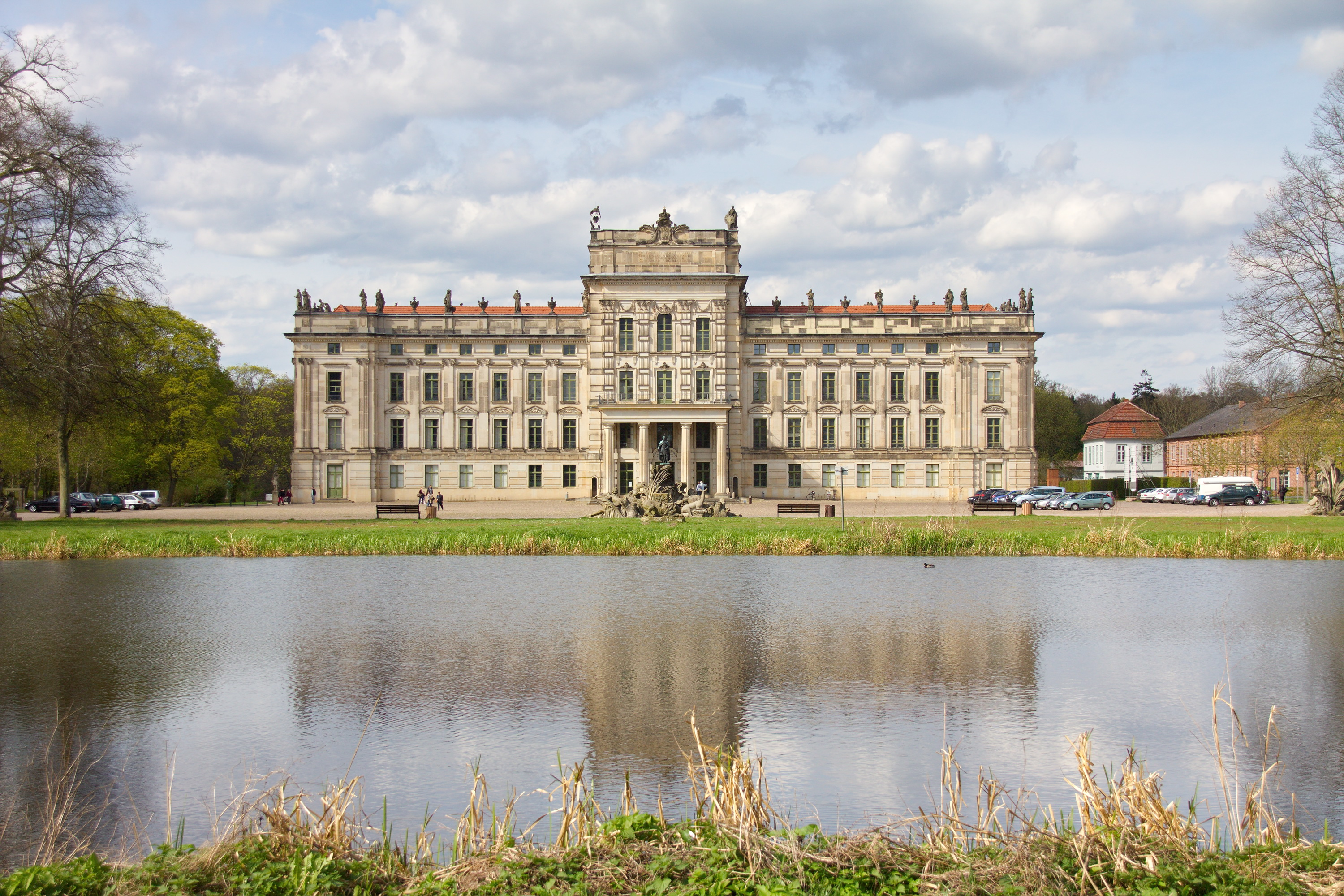 Schloss Ludwigslust in Ludwigslust, Mecklenburg-Vorpommern, Deutschland